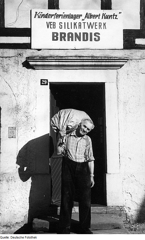 Original image description from the Deutsche Fotothek Wilsdruff-Grund. Hintere Mühle oder Obermühle, Müller Conrad Noack